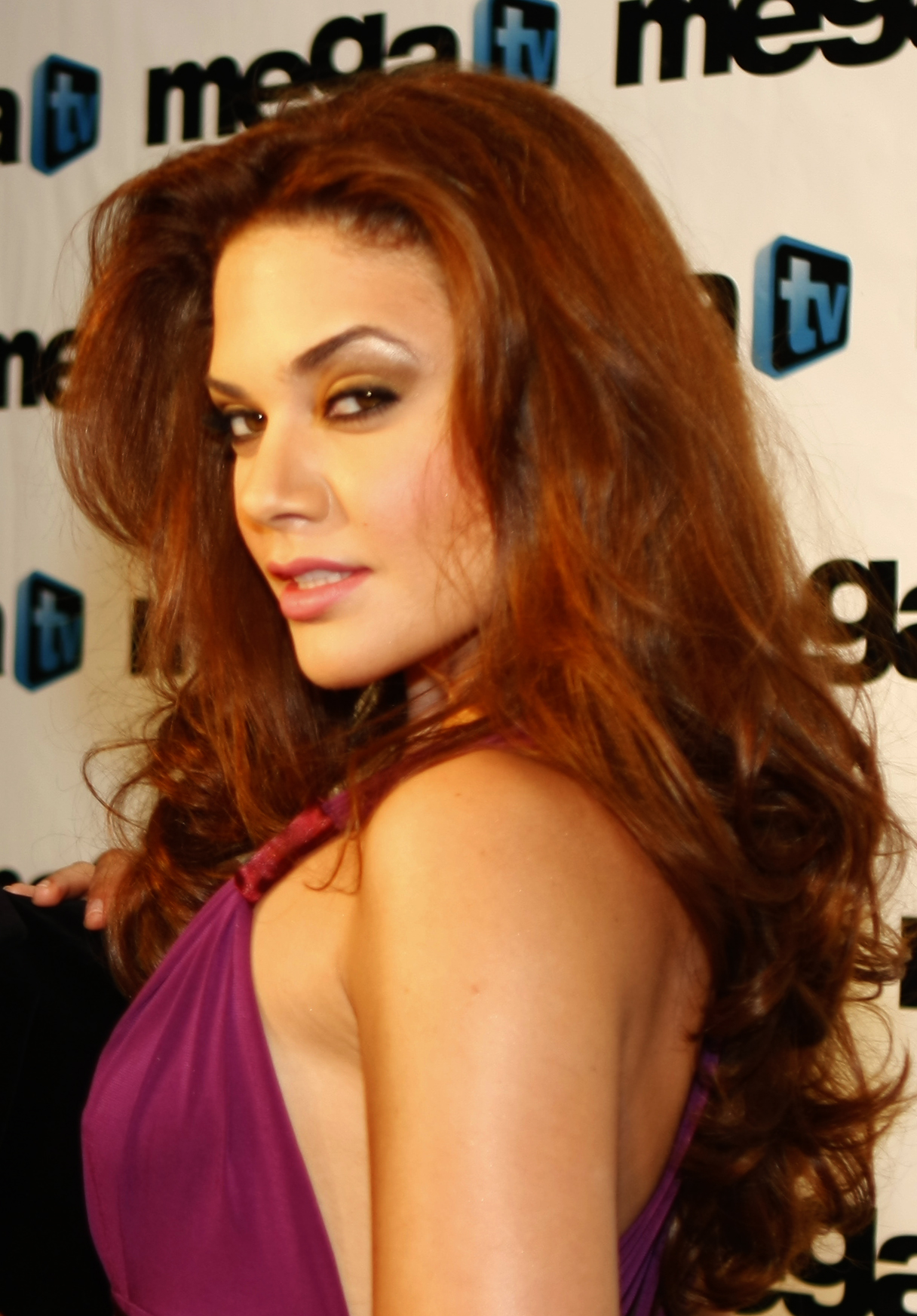 Agustín Fernández y su ex pareja Angélica Celaya